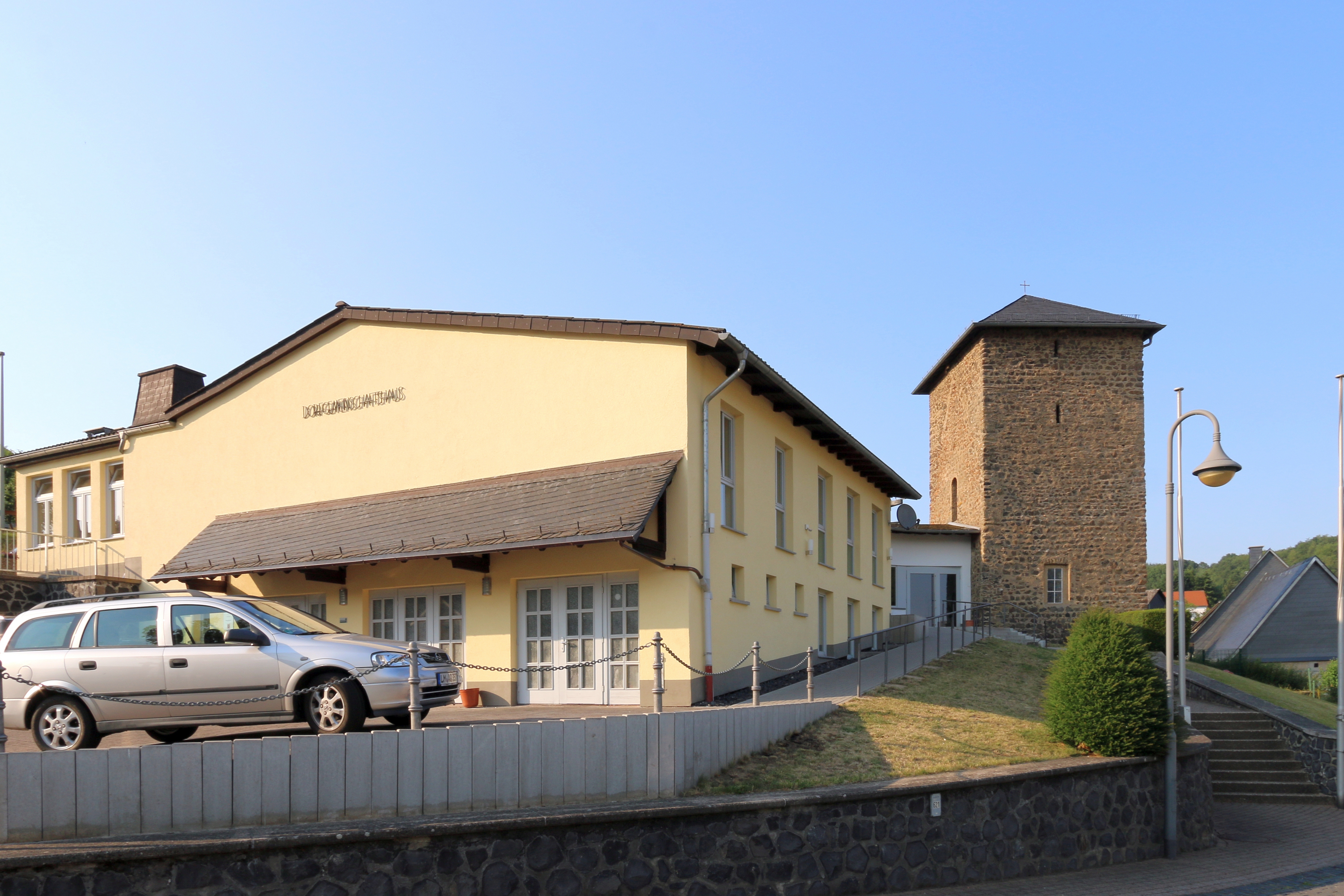 Mengerskirchen-Dillhausen, Landkreis Limburg-Weilburg: Dorfgemeinschaftshaus